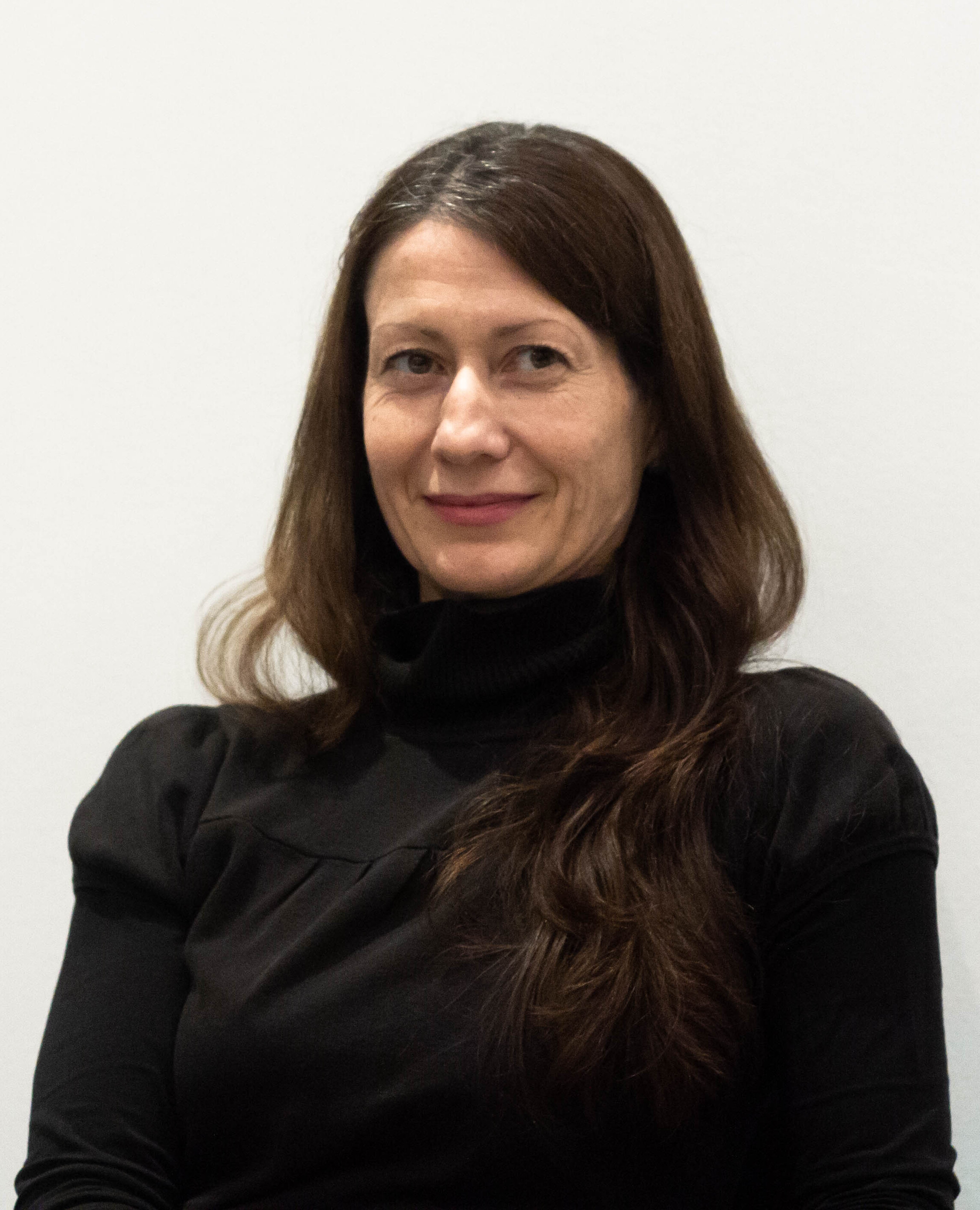 Am 17.November 2018 im Museum Folkwang in Essen. Lesung aus "Liebesroman" und Gespräch mit Clemens Meyer und Alida Bremer